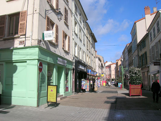 Rues Piétonnes - Rue Maréchal Foch Roanne